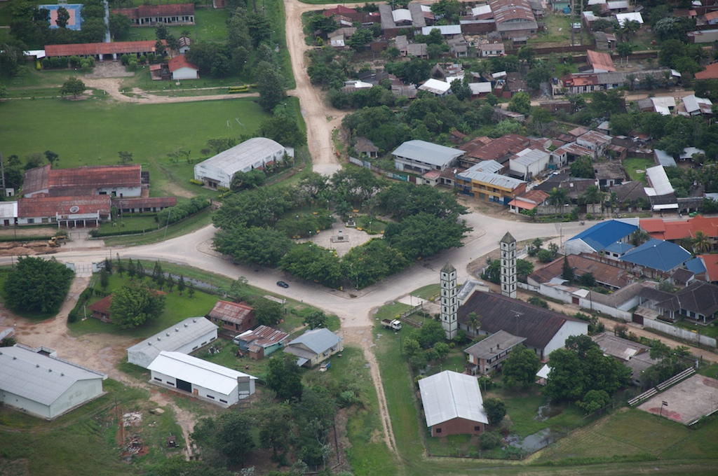 Plaza Alcibiades Velarde Cronembold en Colonia Japonesa San Juan